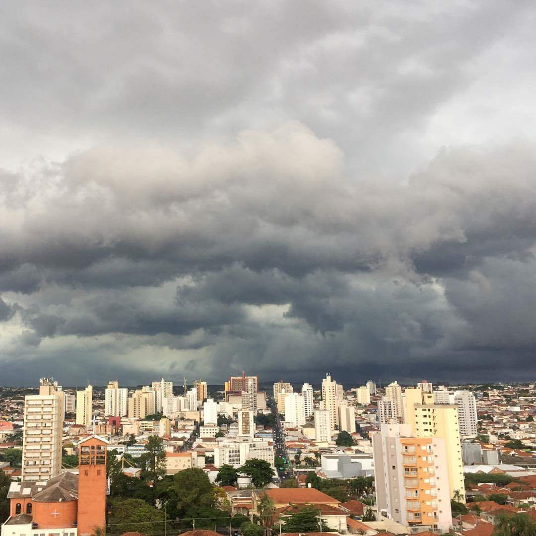 Tempestade se aproximando de Catanduva